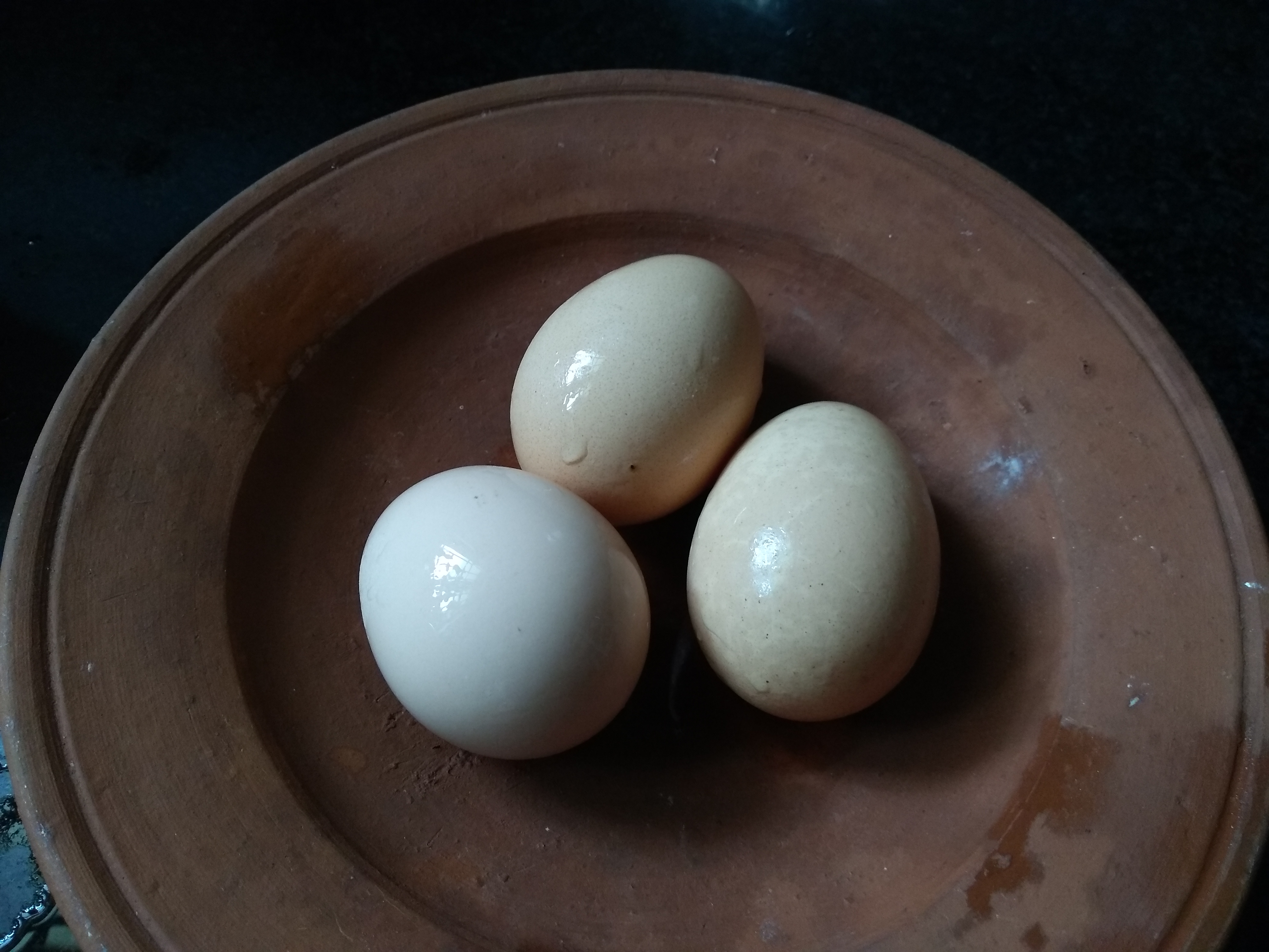 சேலத்தில் உற்பத்தியாகும் நாட்டுக்கோழியின் முட்டைகள்